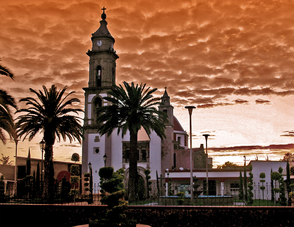 Parroquia de San Martín Obispo, Municipio de San Martín de las Pirámides, Estado de México